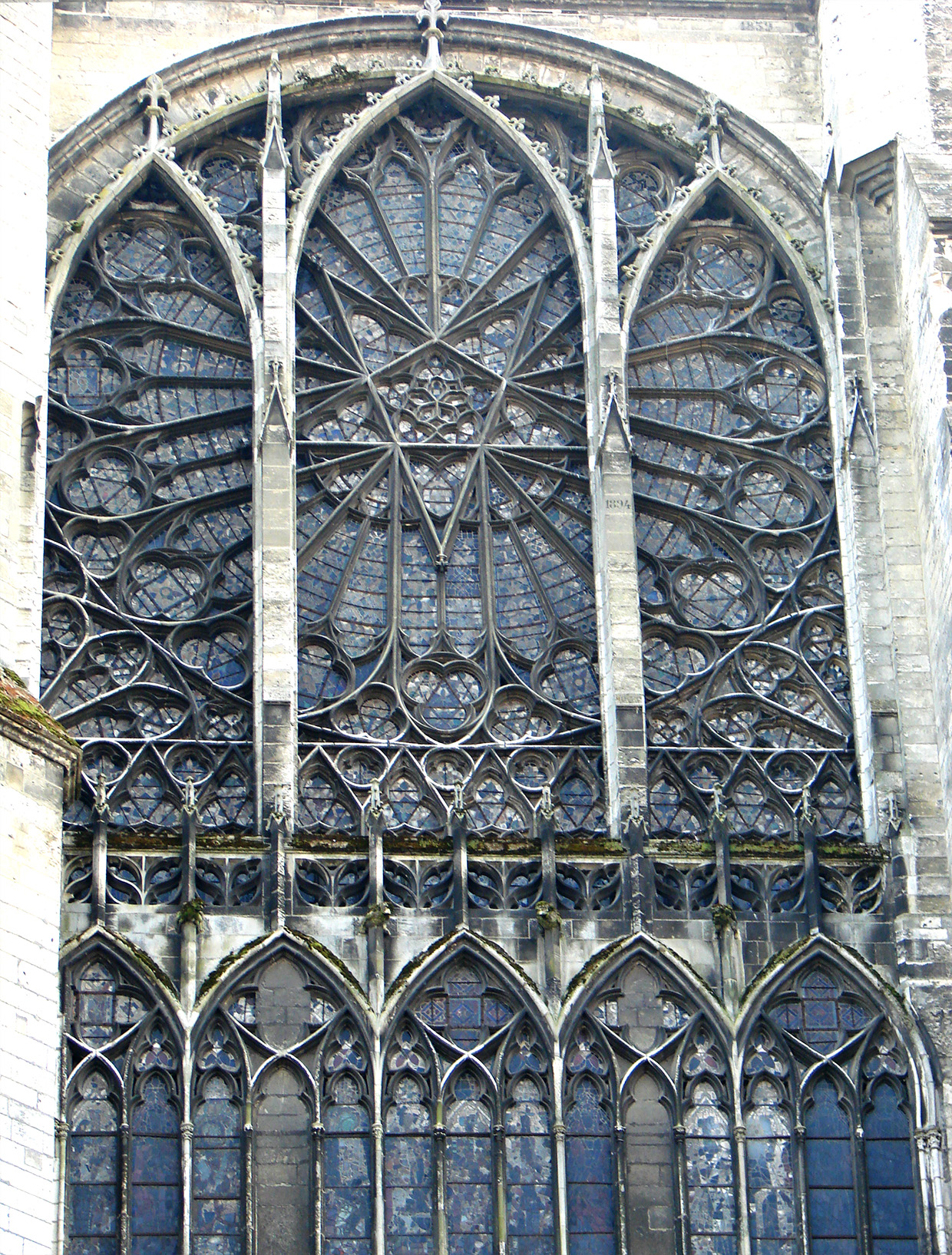 Rose du transept nord de la cathédrale d'Amiens, figurant un pentagramme.